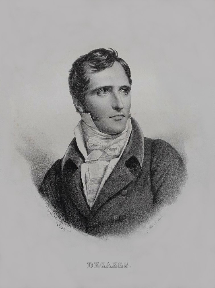 A lithographic portrait of French statesman Élie Decazes, by François-Séraphin Delpech after Louis Dupré. At left: "Dupre / 1828". At right: "G. Lith. de Delpech.".